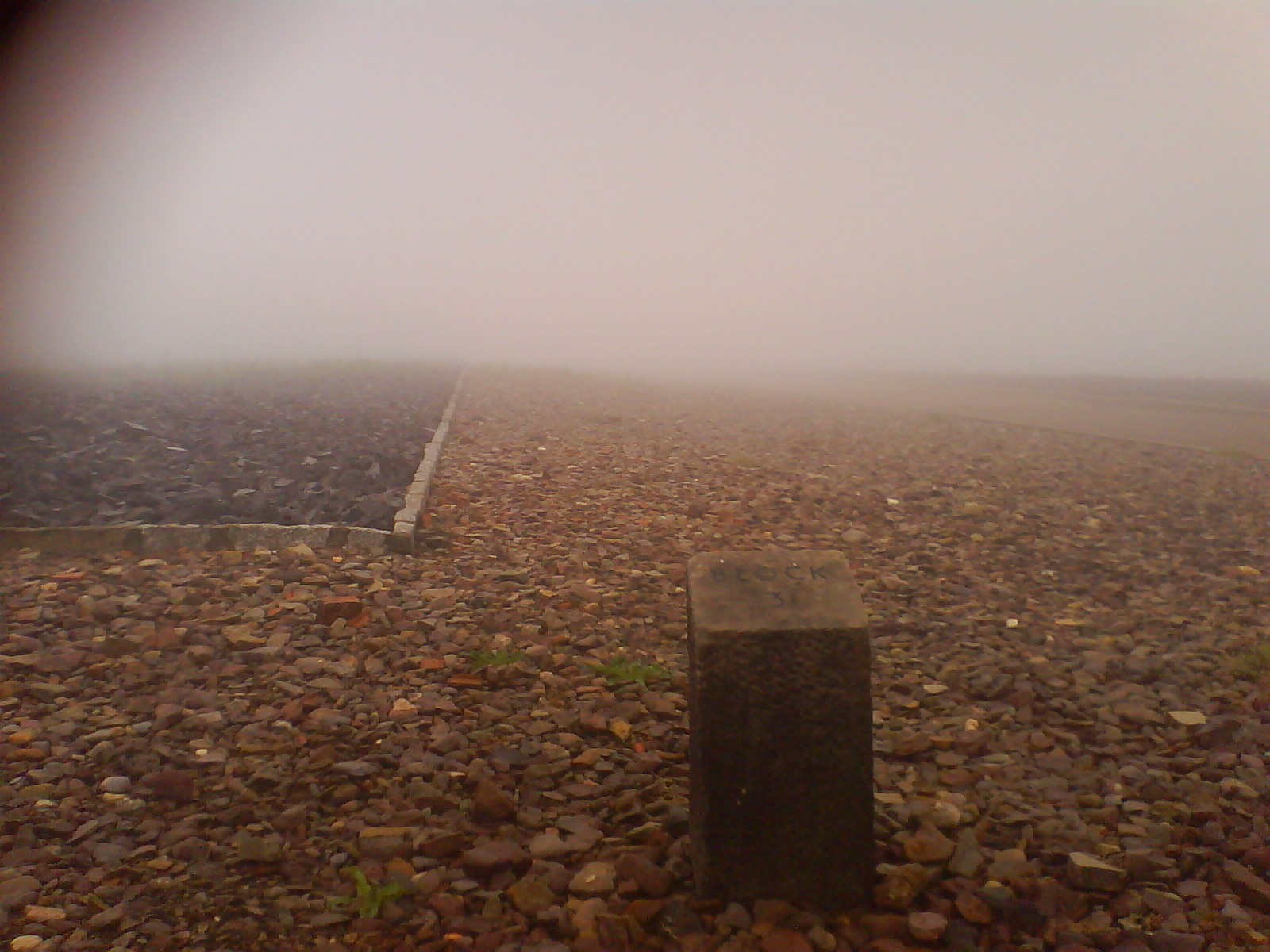 Appelplatz, Buchenwald-Gedenkstätte (nebliger Tag, 2007).